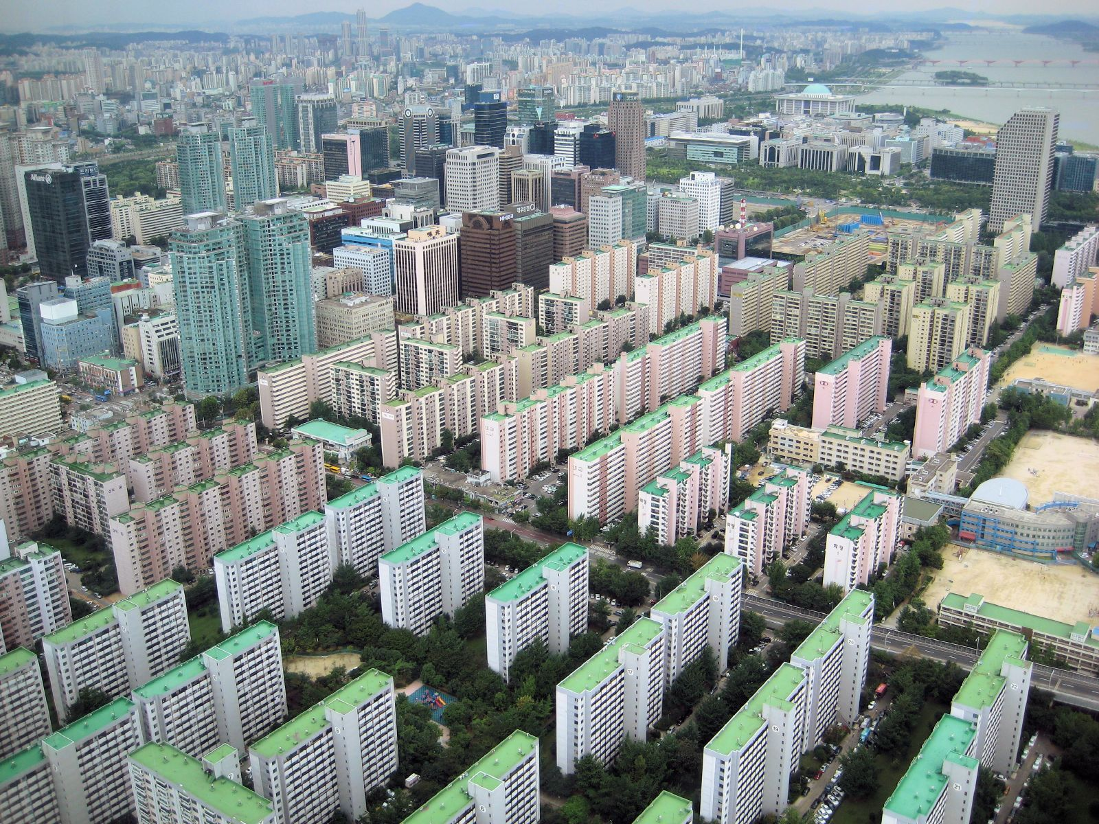 Seoul Suburbs